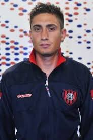 foto de futbolista